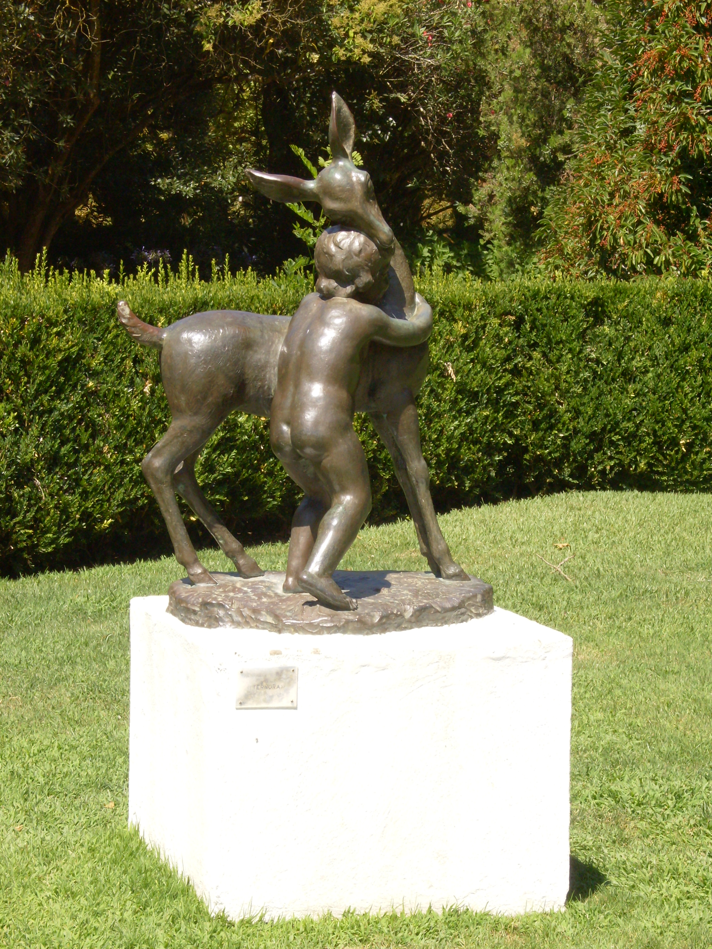 "Ternura", bronze por Henrique Moreira. Parque D. Carlos I, Caldas da Rainha, Distrito de Leiria, Portugal.